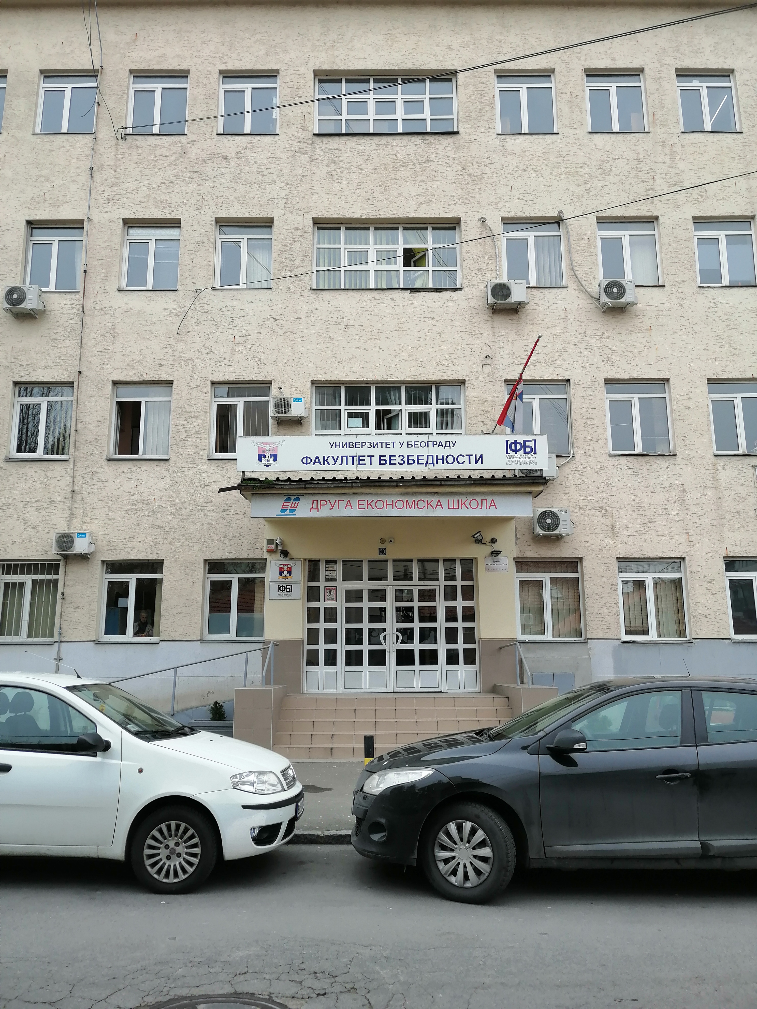 Srpski (latinica): Fakultet bezbednosti Univerziteta u Beogradu